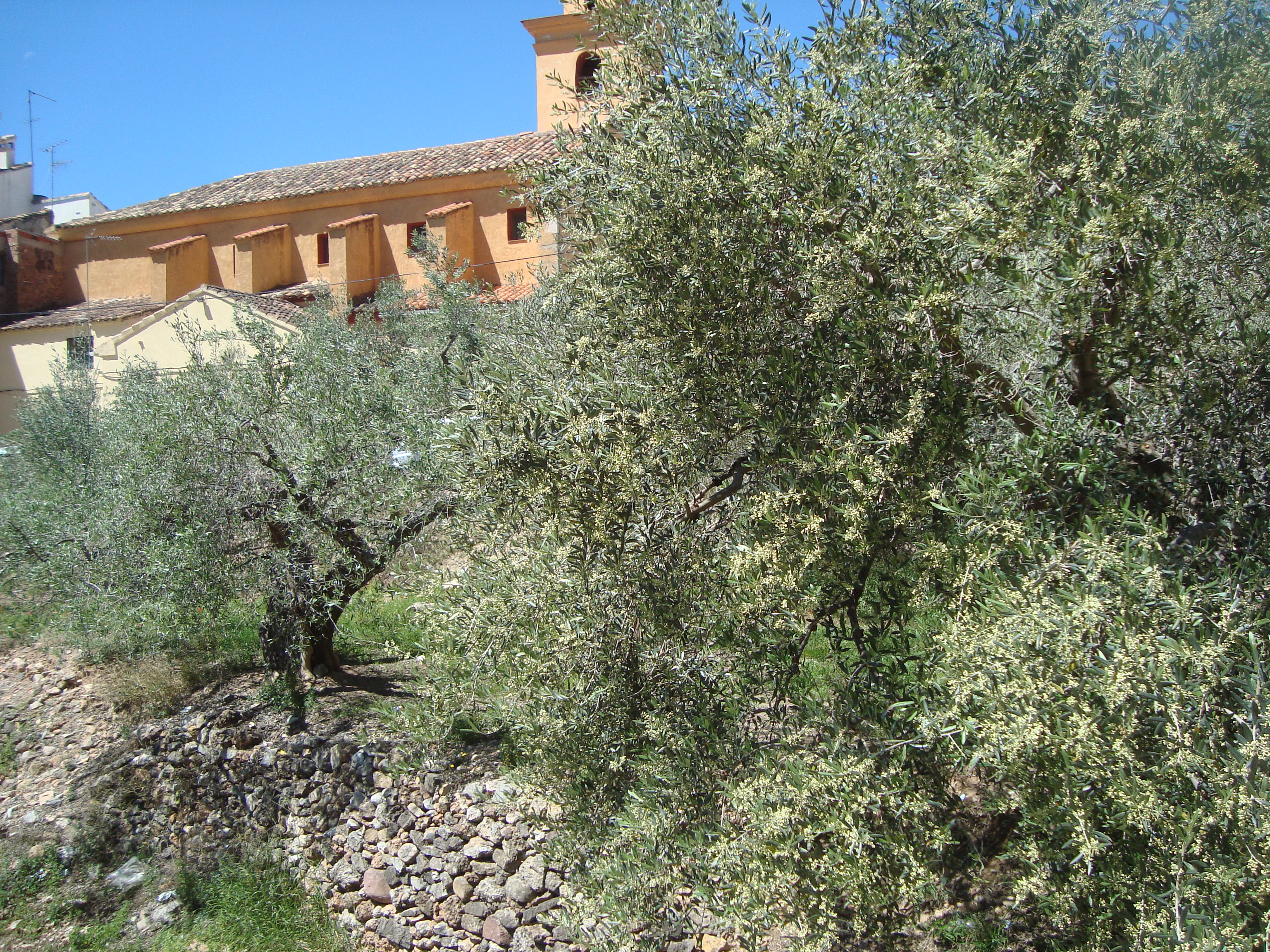 Agricultura:oliveras aceiteras (Torrechiva)